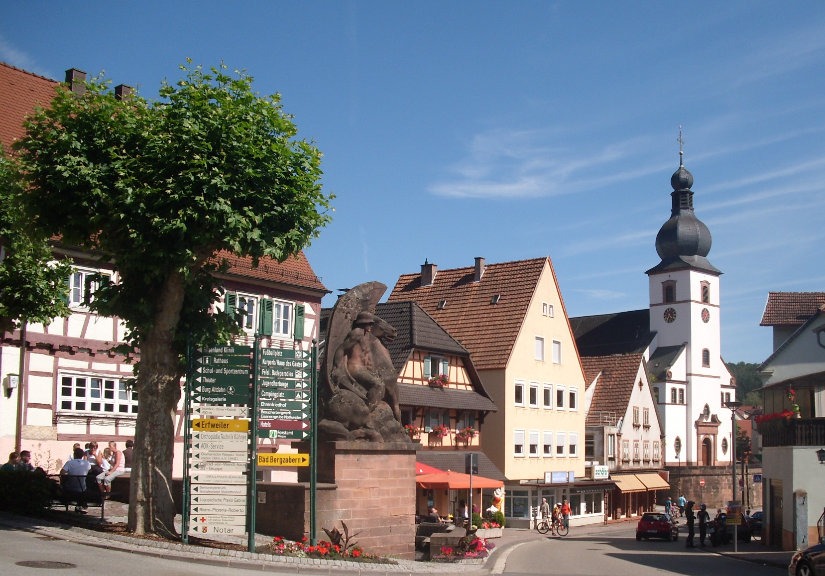 Centrum van Dahn - Verbandsgemeinde Dahner Felsenland - Südwestpfalz - Rijnland-Palts - Duitsland